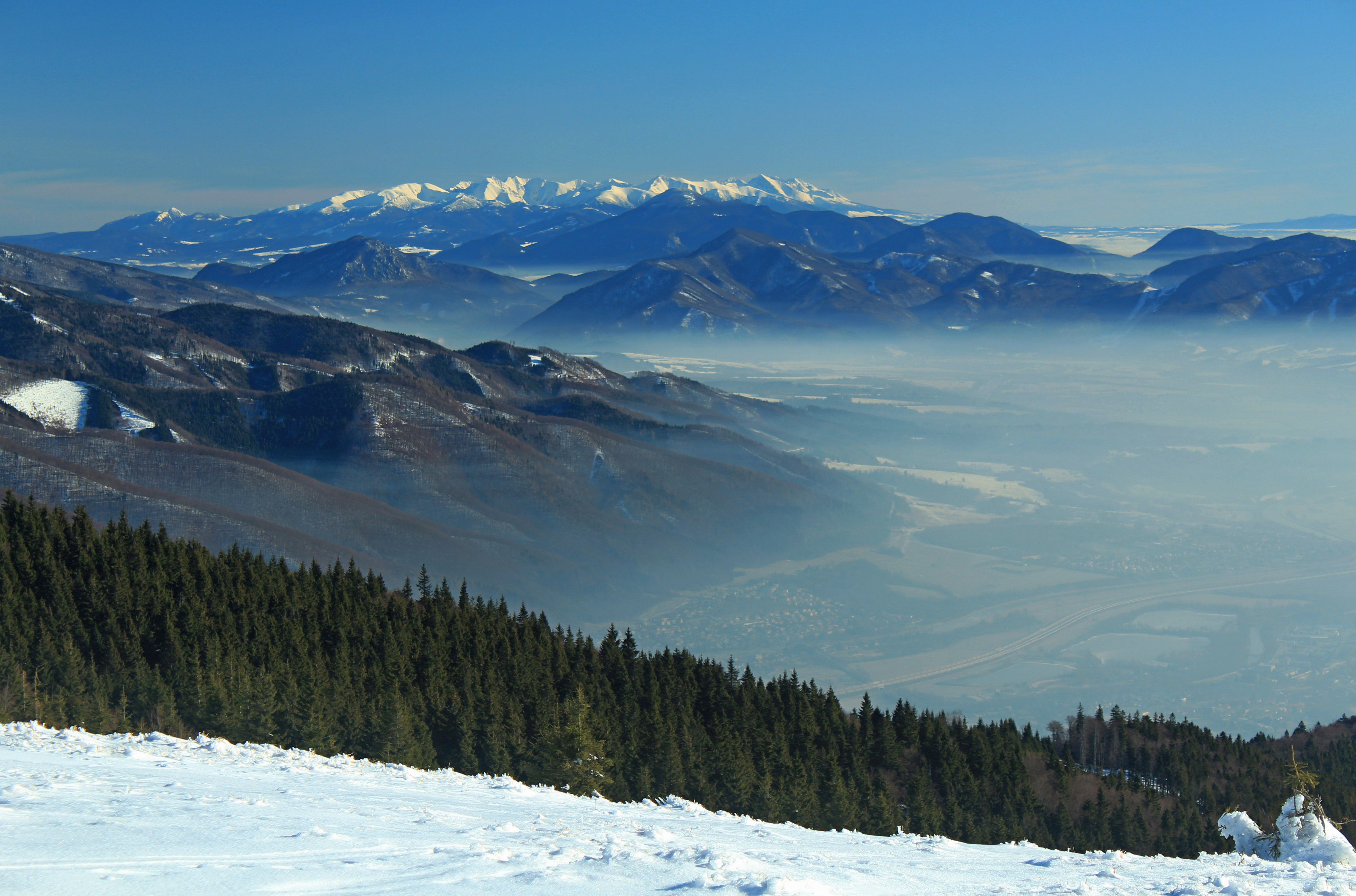 Západné a Vysoké Tatry, v popredí Choč